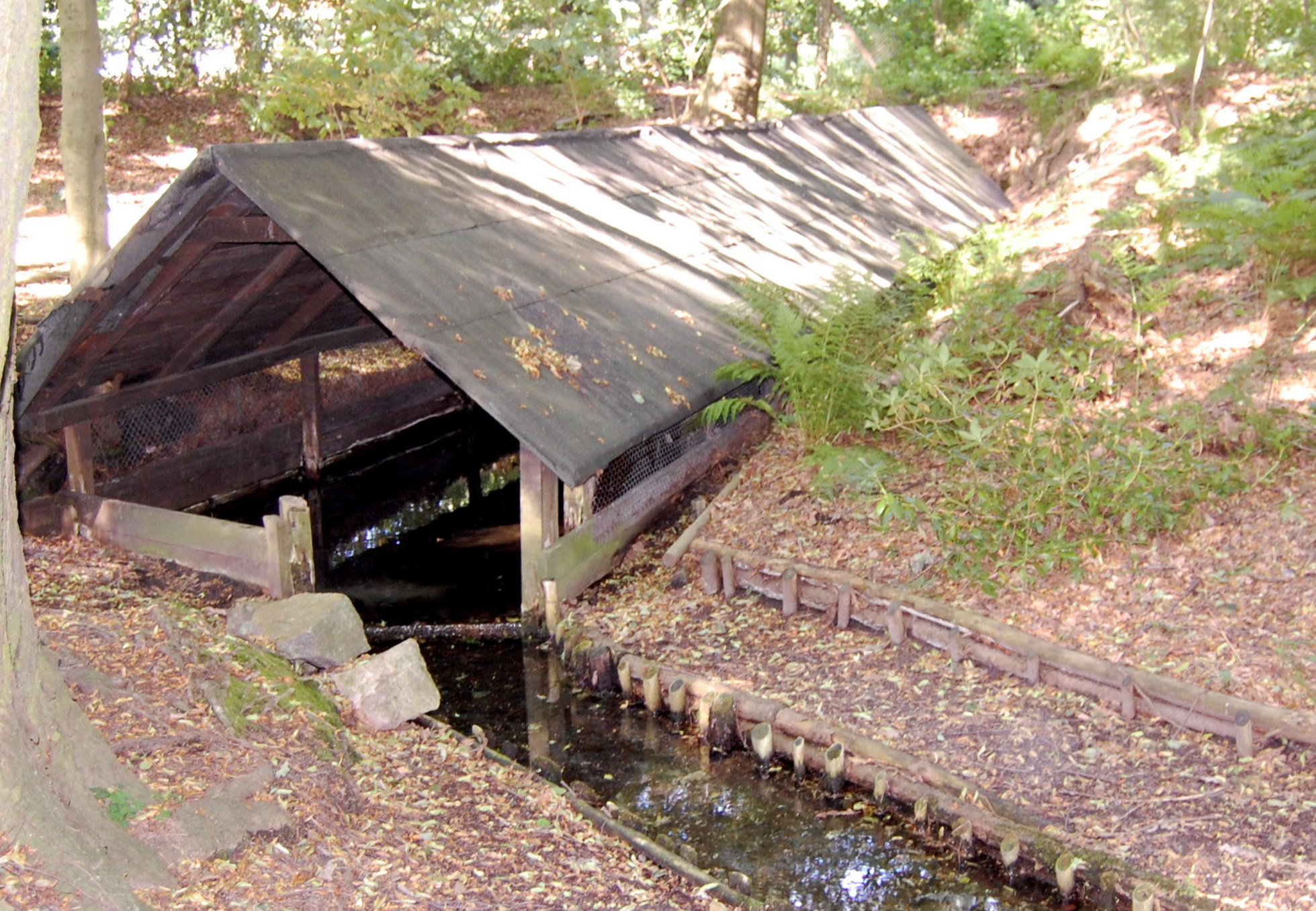 Pintschens Quell bei Byhlen Dolnoserbski: Pintšowe žrědło